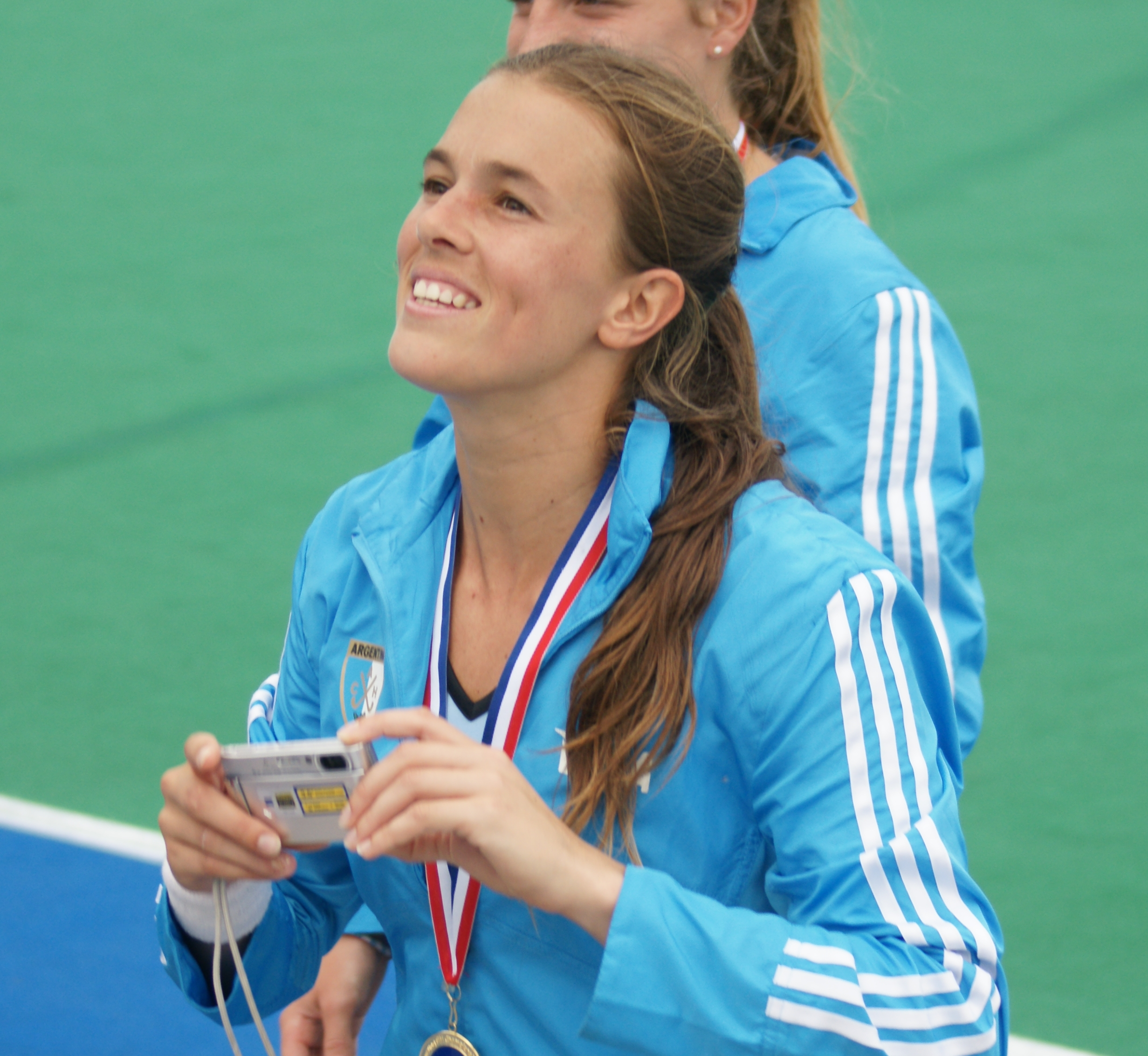 Carla Rebecchi